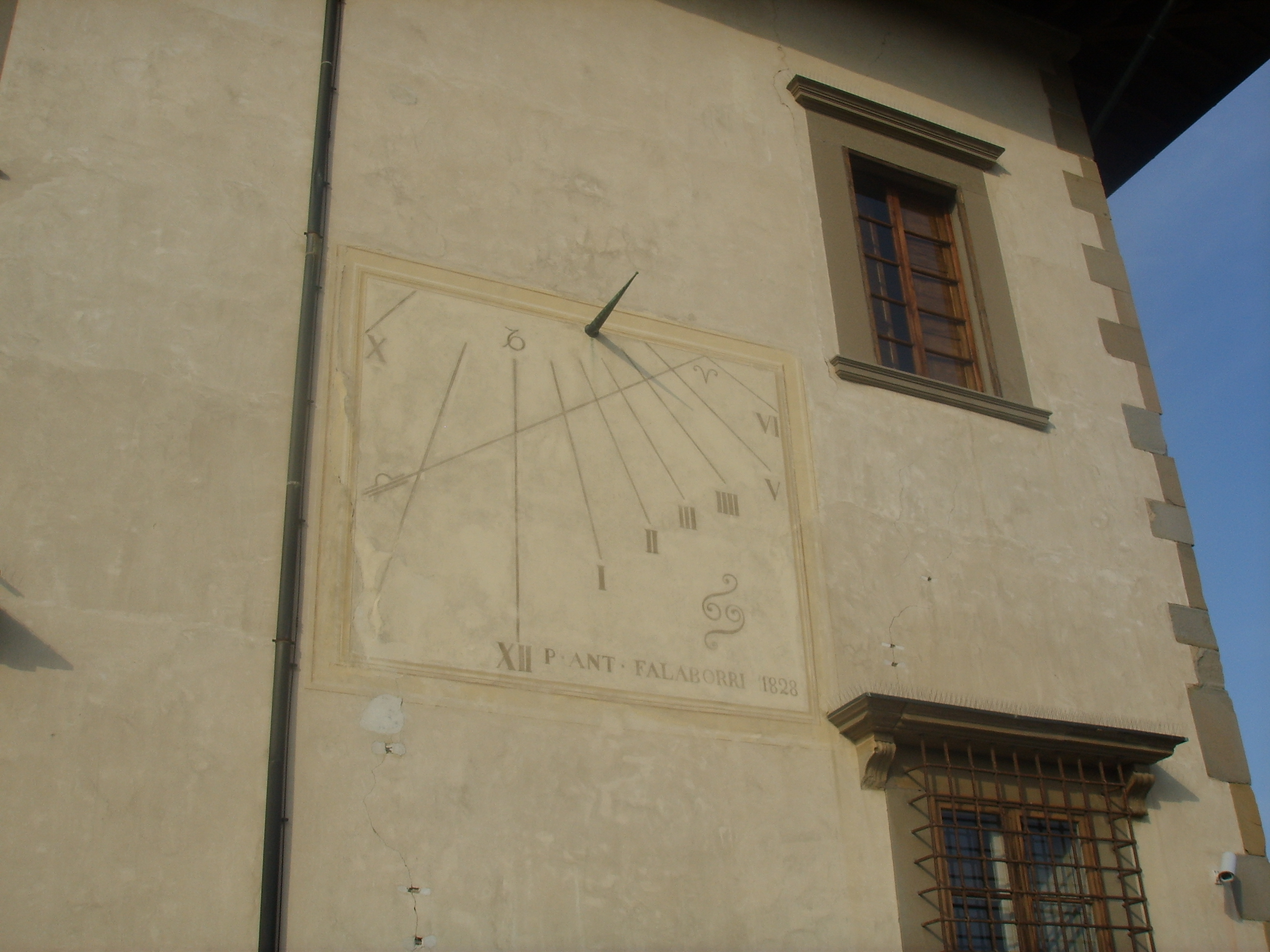 Poggio a Caiano Villa outside view in Poggio a Caiano, Italy